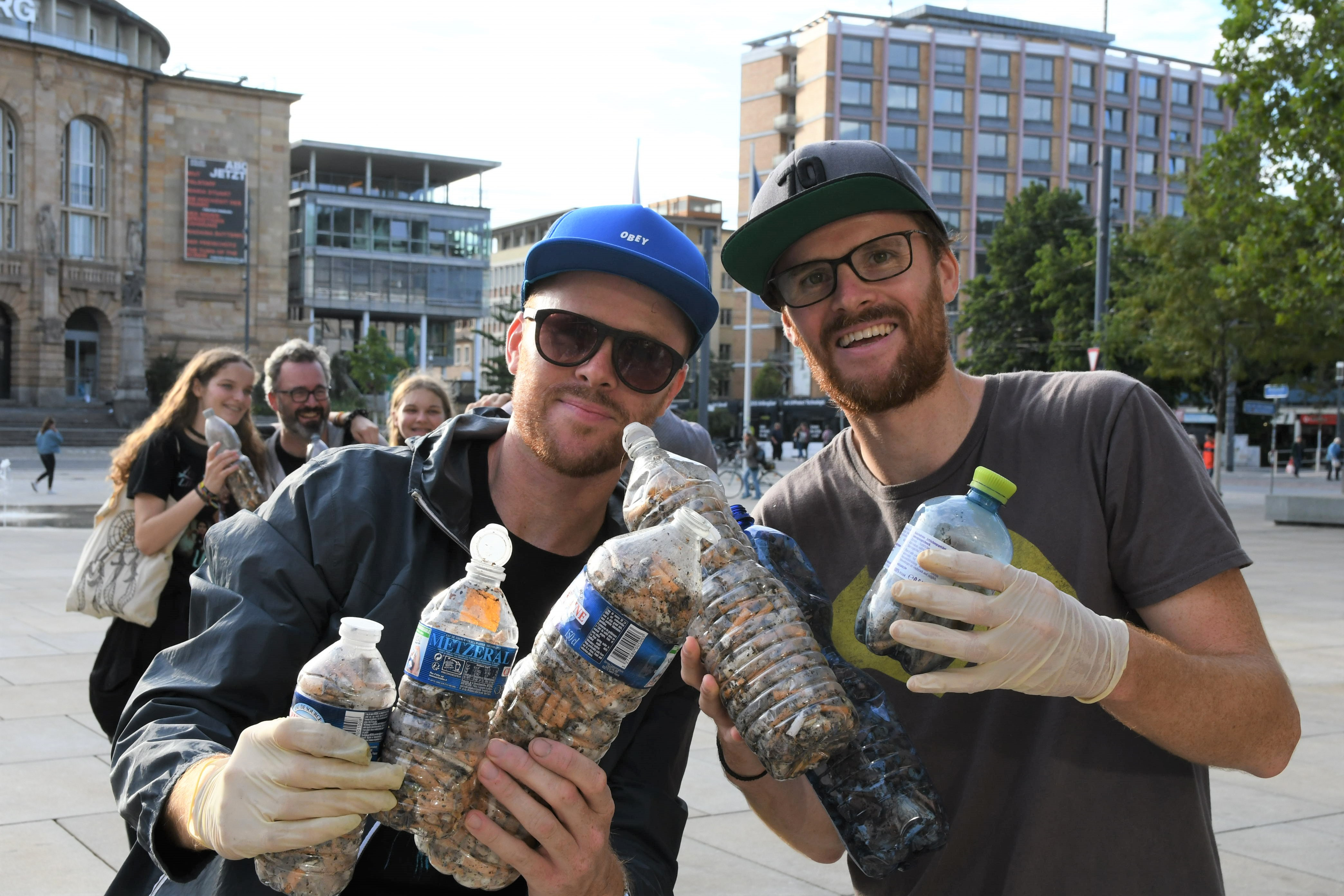 Zigarettenstummel sind giftig und verschmutzen die Umwelt. Till und Felix Neumann, das Hip-Hop-Duo Zweierpasch haben sie in Flaschen gesammelt und Bilder von dieser Aktion mit dem Hashtag #FillTheBottle über Social Media verbreitet